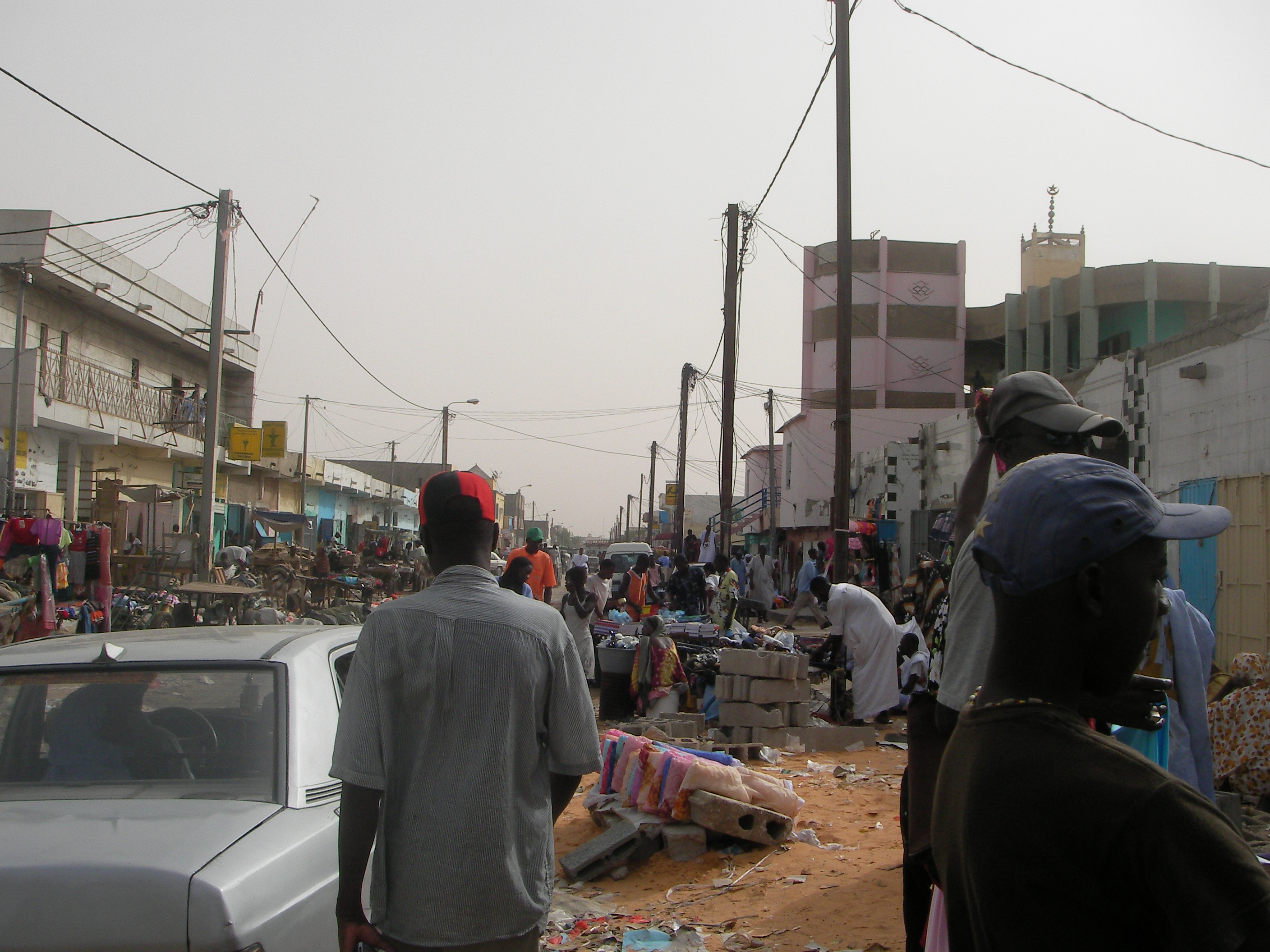 Street scene in Nouakchott